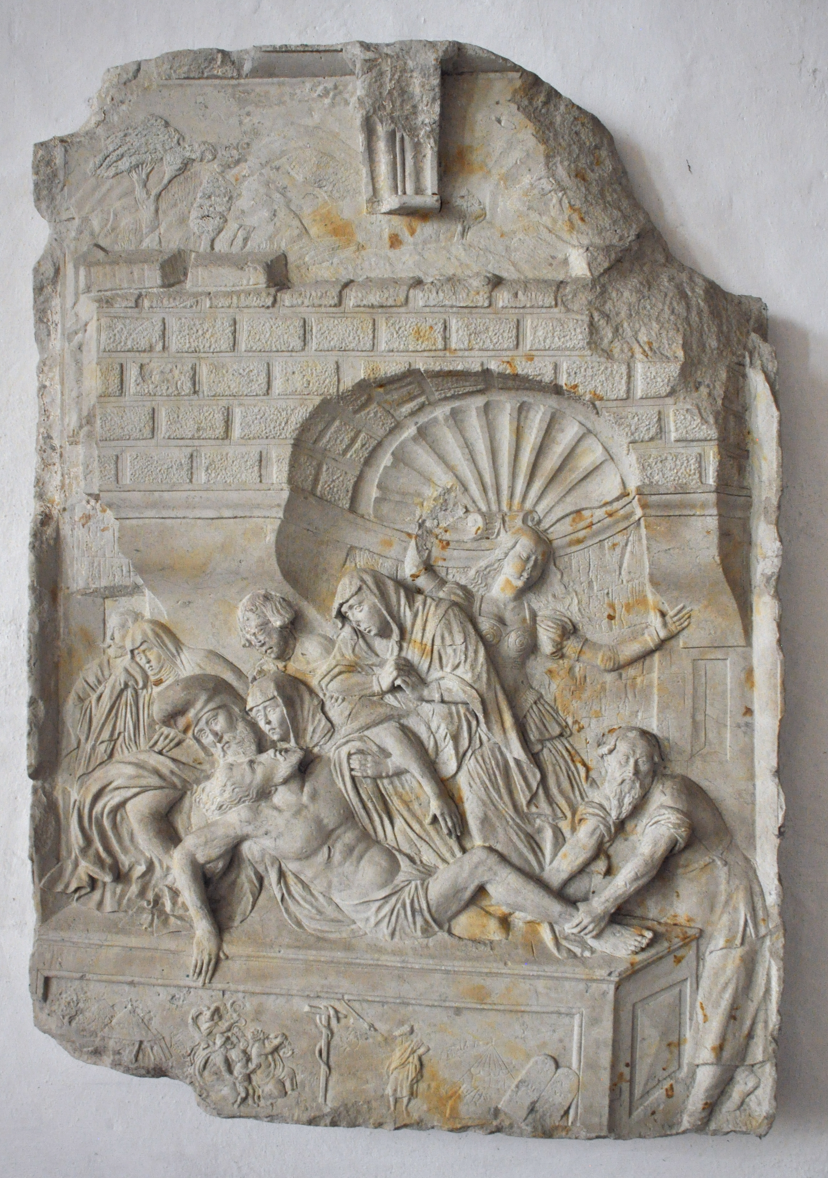 Torgau, Marienkirche, Relief einer Grablegung (Rest eines Epitaphs?)